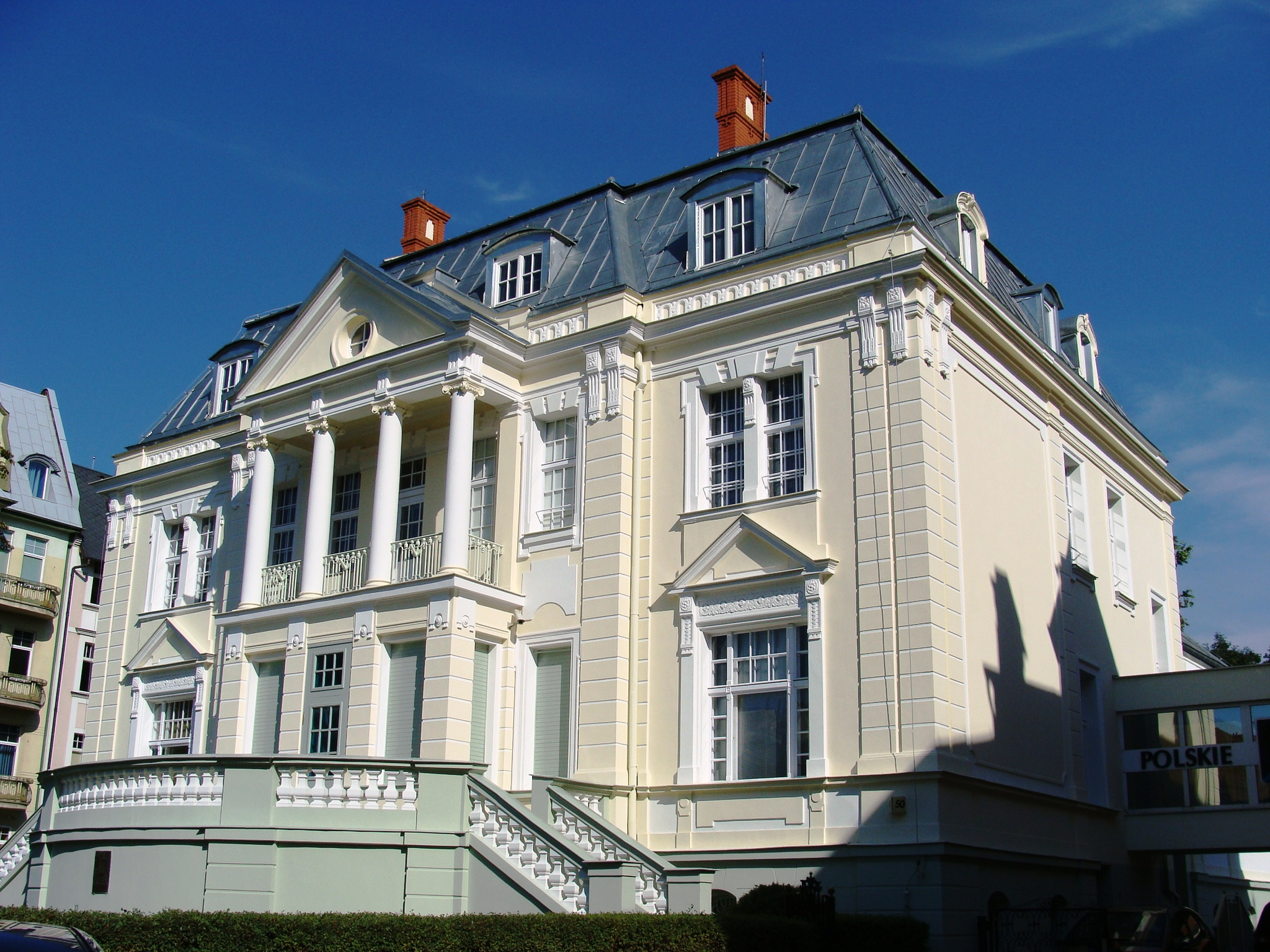 Bydgoszcz, willa, 1904